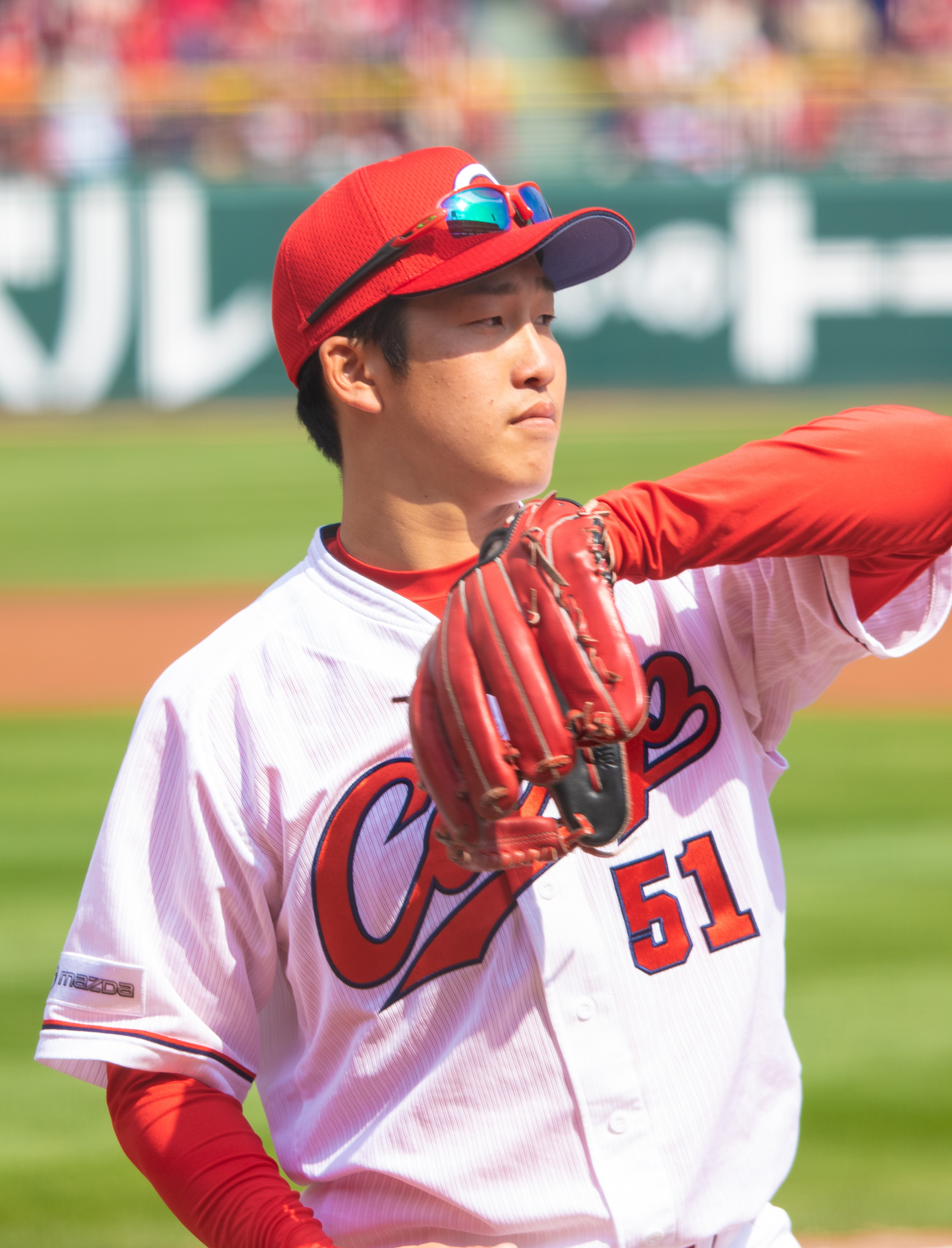 2019/3/12 マツダスタジアム